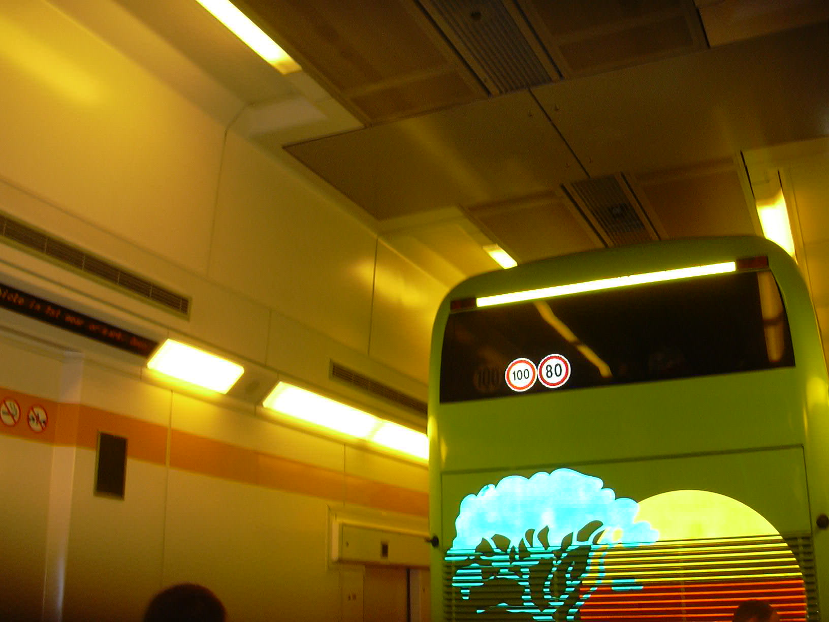 A Csalagútban közlekedő szerelvény belseje